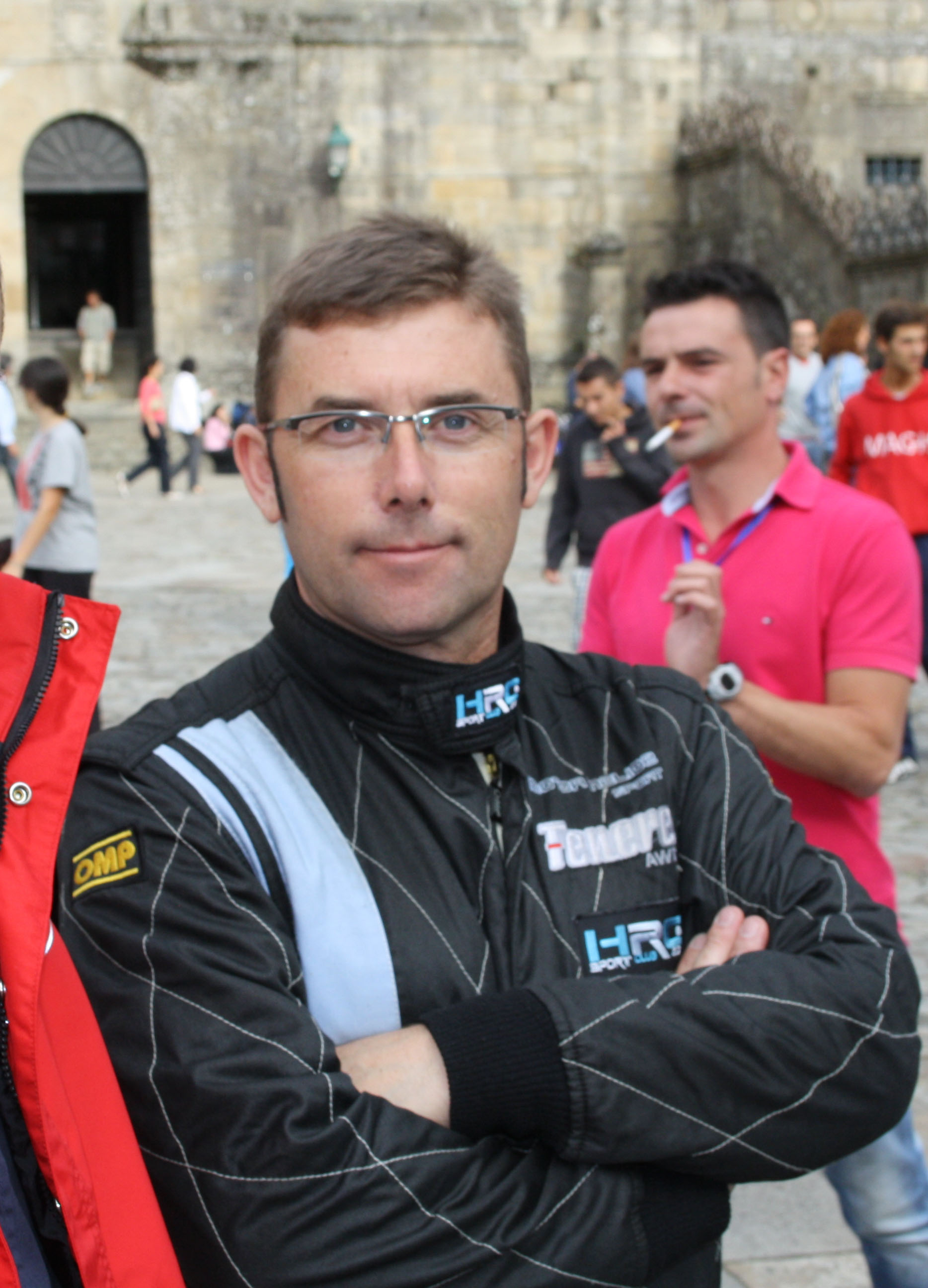 Jesus Ferreiro en 2012.